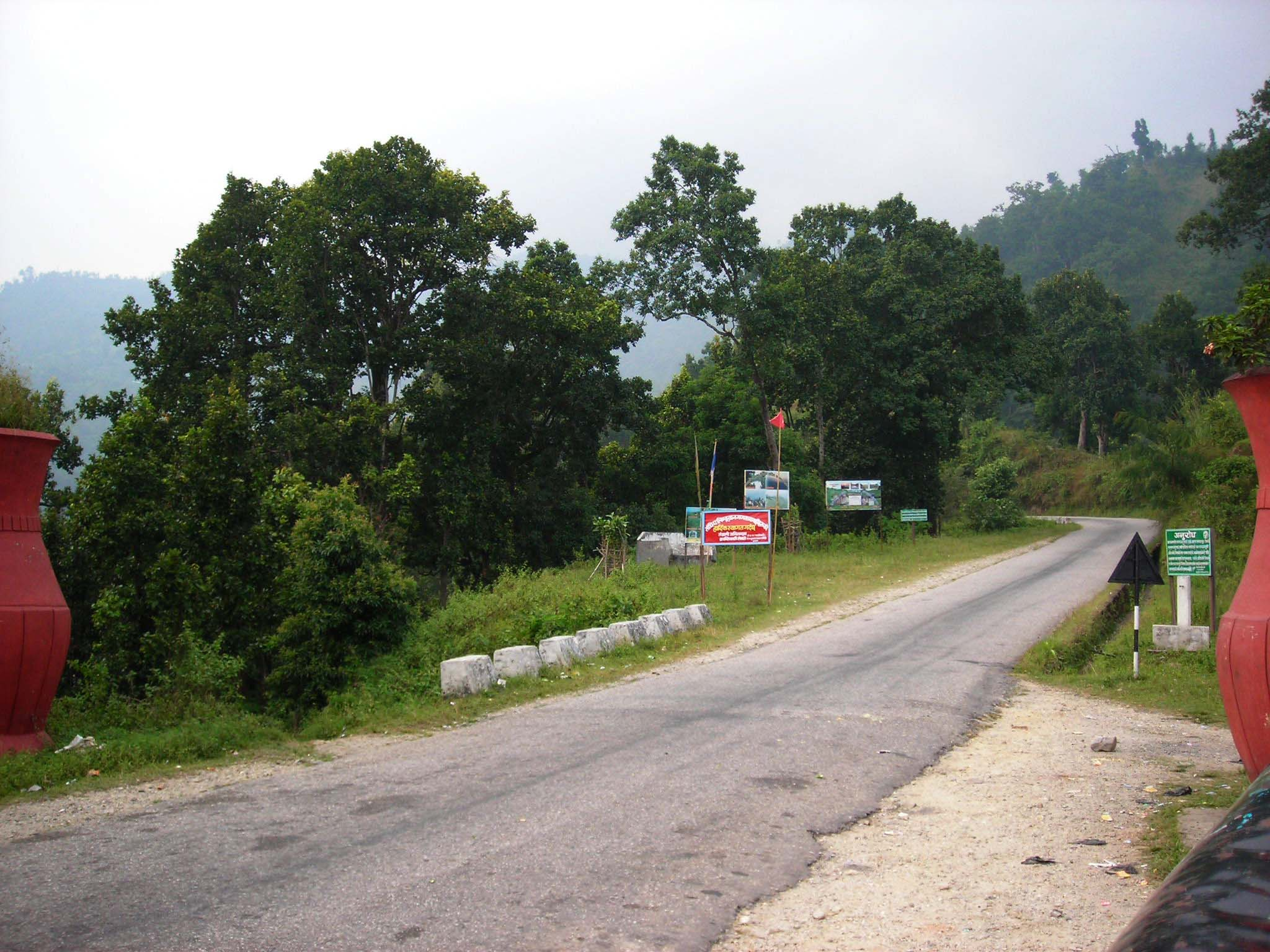 नेपाली: इलाम प्रवेशद्वार